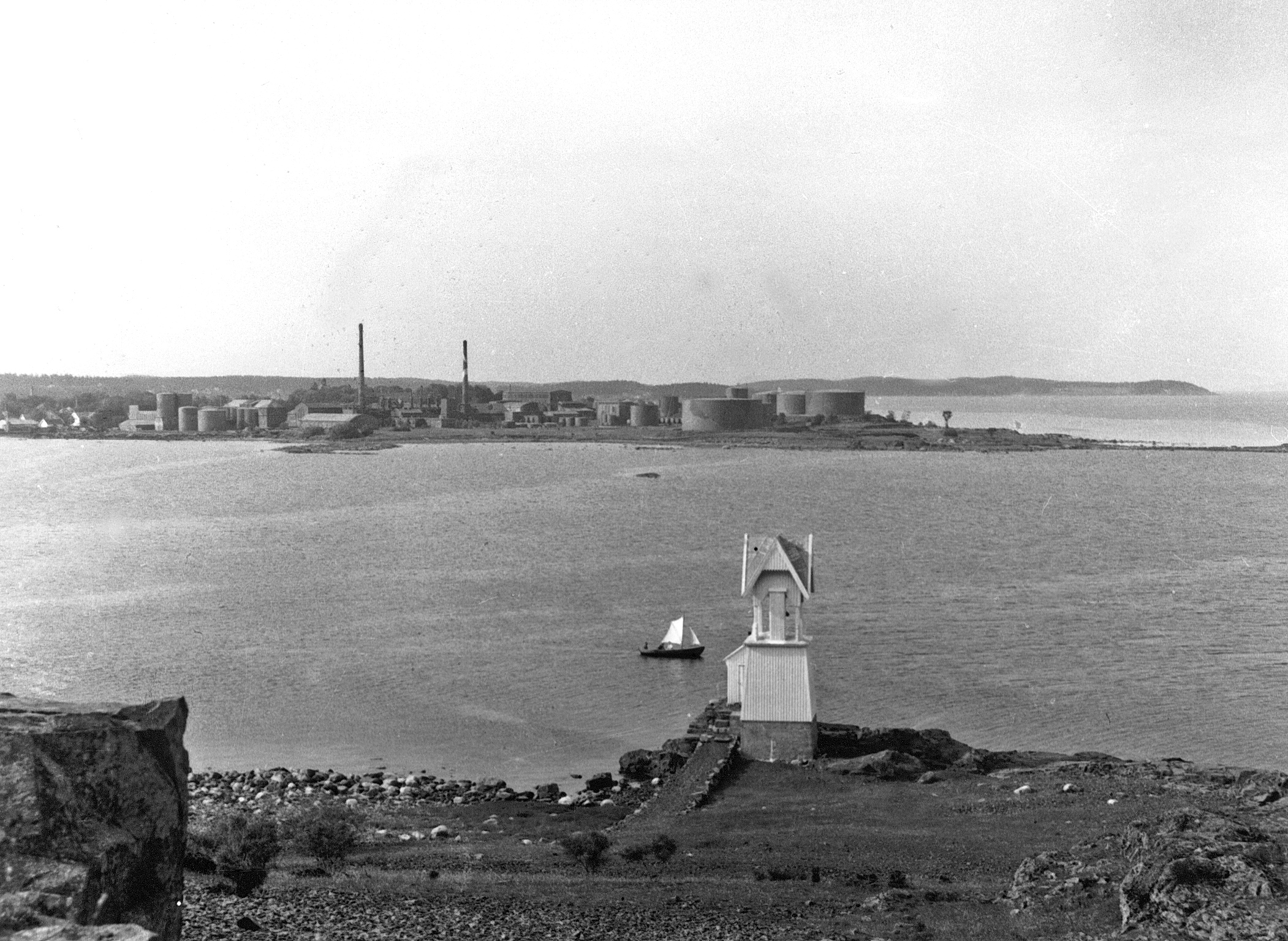 Foto tatt fra Torgersøya med Torgersøy tåkeklokke foran i bildet Bildet er hentet fra Arkivverket. Kamuflasjemaling av Vallø oljeraffineri Arkivinstitusjon : Statsarkivet i Stavanger Arkivnavn : Pa 1536 - Esso Norge as, Vallø Oljeraffineri og lager Sted : Norge, Vestfold, Tønsberg, Valløy Emneord: Olje, Oljeraffineri, Petroleum Avbildet